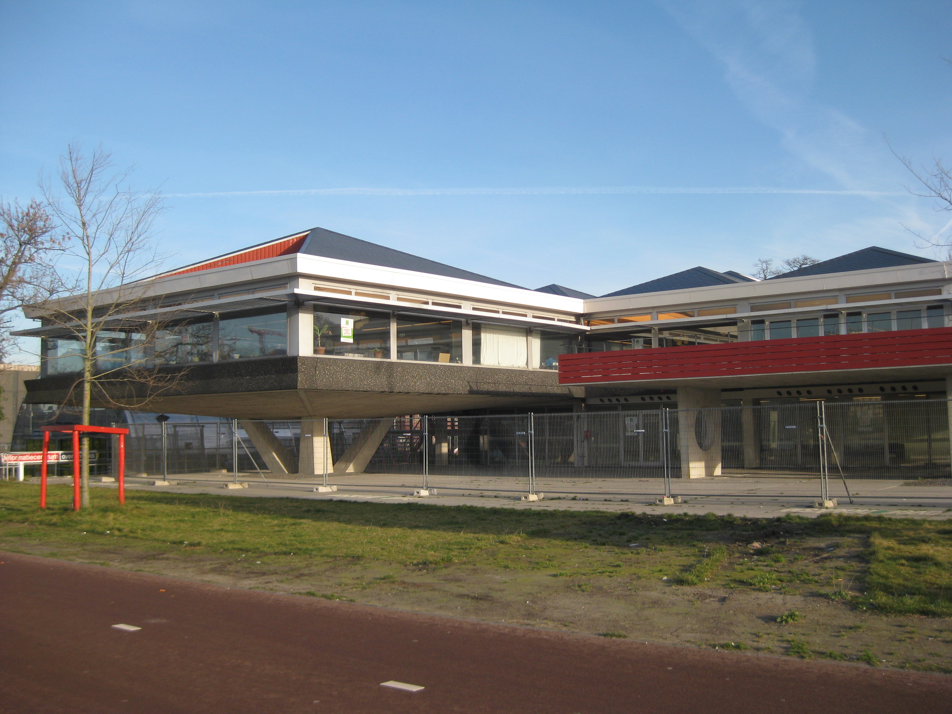 Informatiecentrum van nieuwe wijk in Amsterdam-Noord: Overhoeks